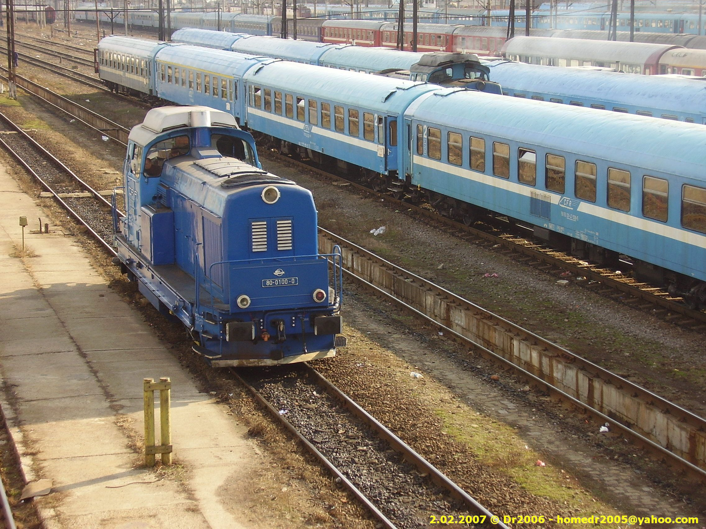 CFR Clasa 80 mozdony (Bukaresti Grivita rendezőpályaudvar, Románia)